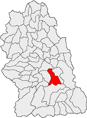 Categorie:Hărţi ale judeţului Hunedoara